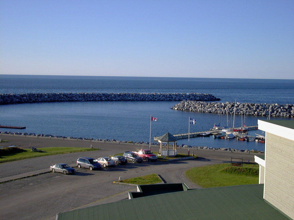 Marina de St-Anne-des-Monts en Gaspésie sur le bord du fleuve St-Laurent.